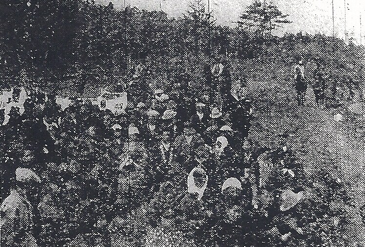 昭和5年4月14日前後に宮城県大谷村で行われた、競馬（花競馬）の光景